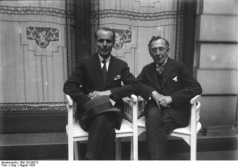 Prof. Arthur Berson, der bekannte Gelehrte und langjährige Inhaber des Welt-Höhenrecordes im Freiballon, vollendete das 70. Lebensjahr. Im Juli 1891 vollführte er die erste Ballonfahrt mit der "Preussen" in die Stratosphäre und erreichte dabei eine Höhe von 10800 m.